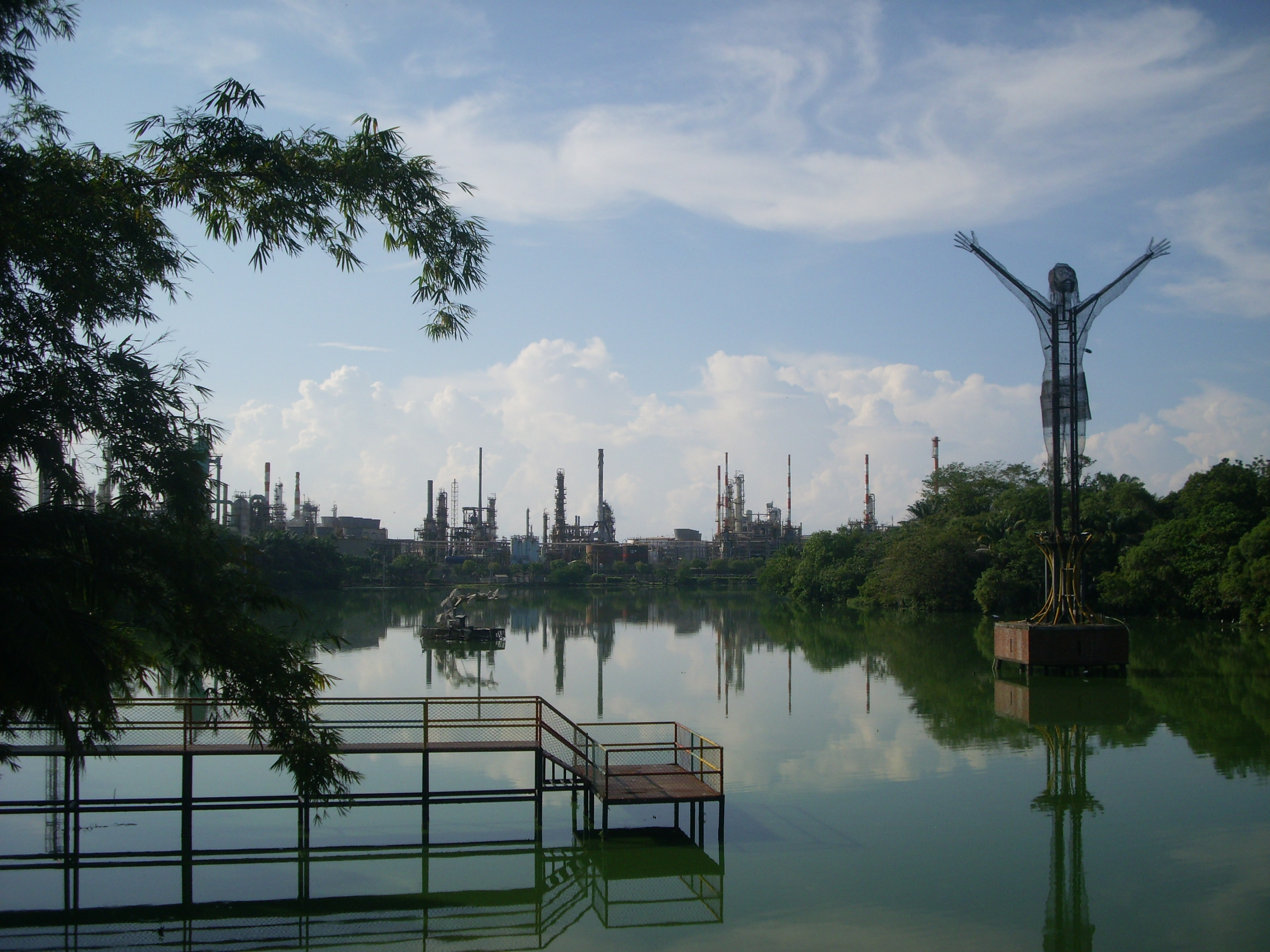 Barrancabermeja, Santander Department, Colombia